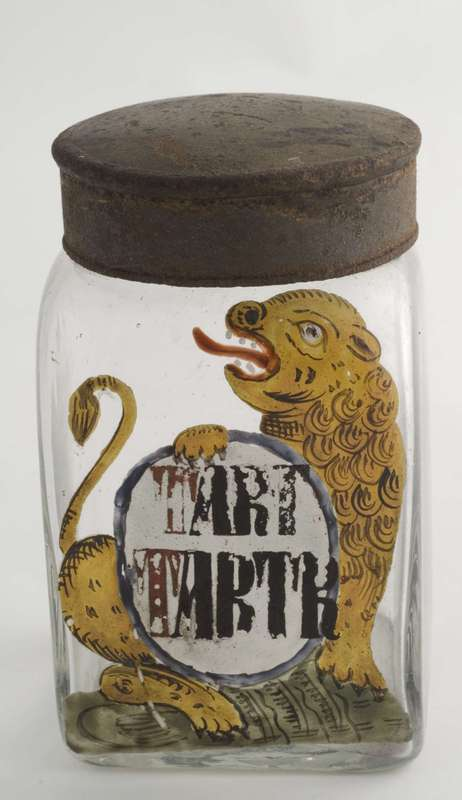 Tyskprodusert standglass i barokk fra Løveapoteket i Bergen, opprettet 1705. Tilhører Norsk Farmasihistorisk Museum. Foto Jon-Erik Faksvaag / Norsk Farmasihistorisk Museum, NFA.02909AB.